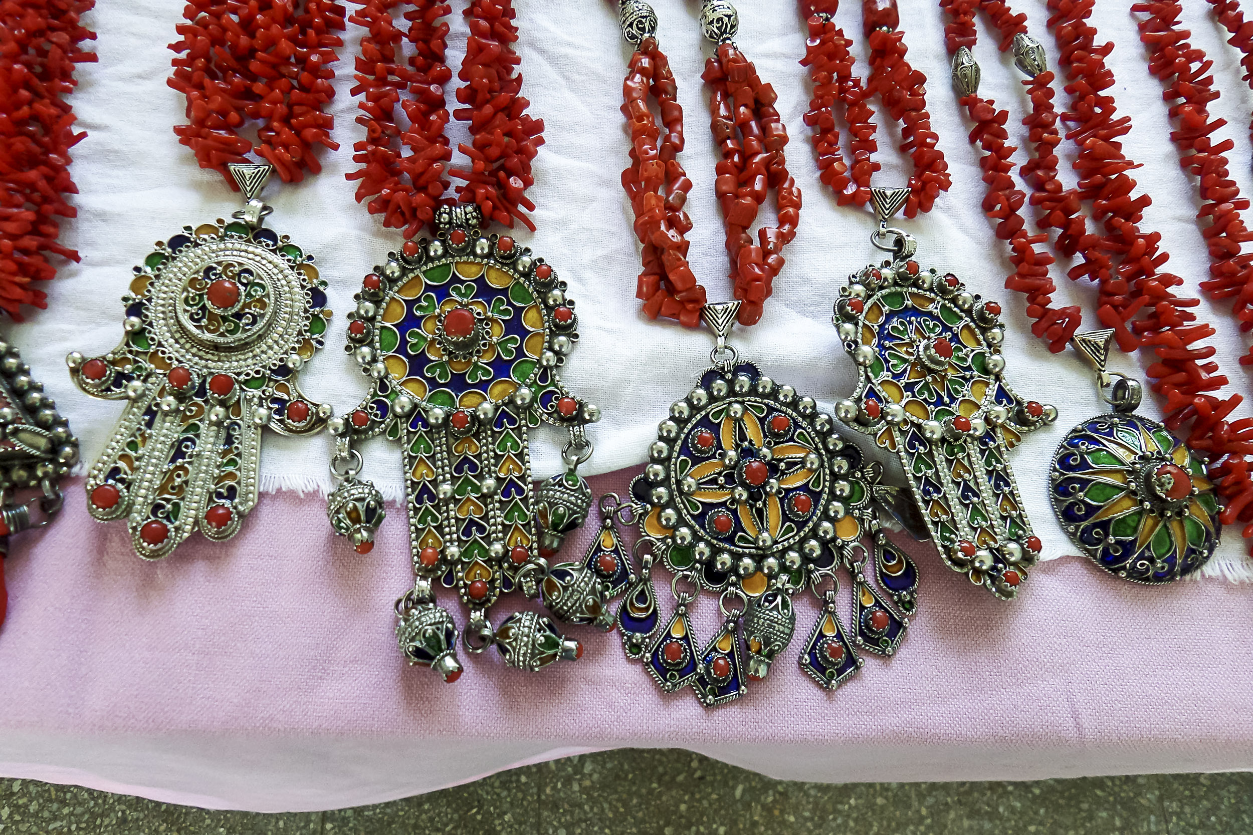 Bijoux de Beni Yenni - Tizi Ouzou, Algérie حلي من بني يني - ولاية تيزي وزو - الجزائر